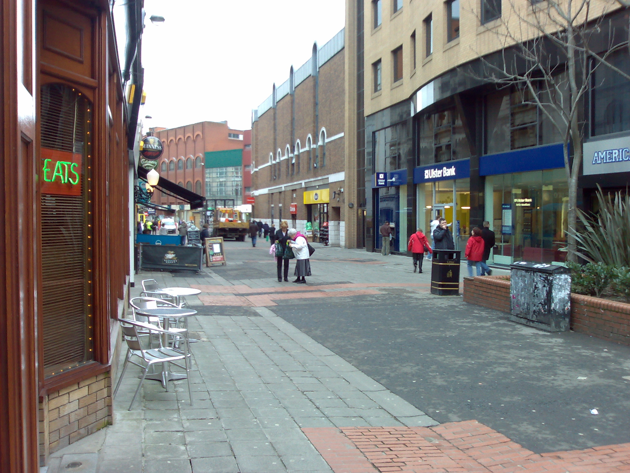 Rua pedestre em Belfast. Pedestrian street in Belfast.